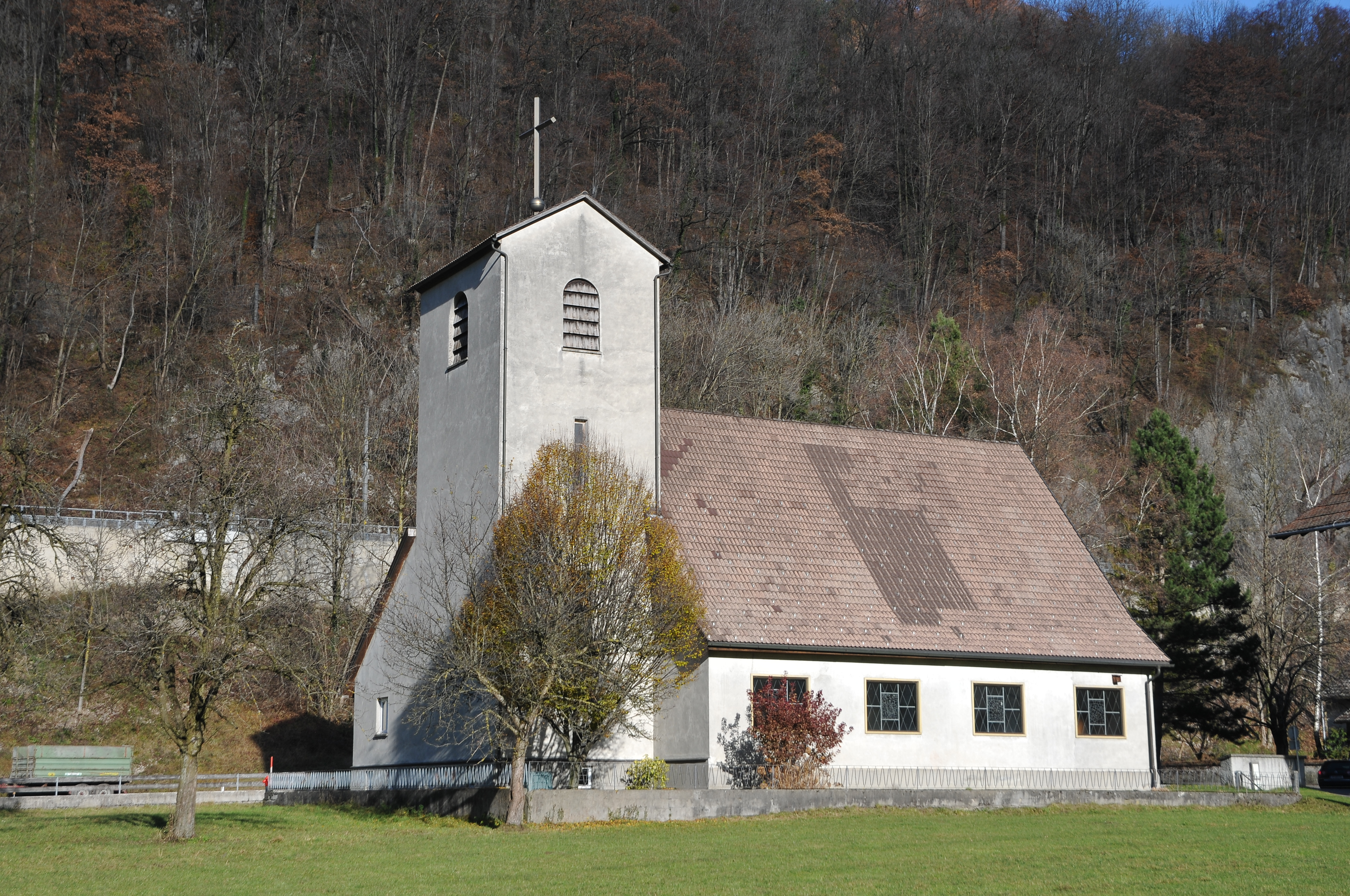 Die Pfarrkirche Heiligste Dreifaltigkeit, (Bings) ist eine römisch-katholische Kirche in der Ortschaft Bings in der Stadtgemeinde Bludenz. Die der heiligsten Dreifaltigkeit geweihte Pfarrkirche wurde von 1953 bis 1955 für die Ortschaft Bings und die daneben liegende Gemeinde Stallehr nach Plänen des Architekten Werner Pfeifer erbaut.